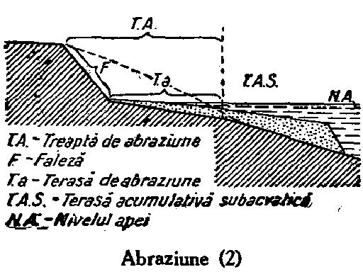 Schemă a procesuuli de abraziune